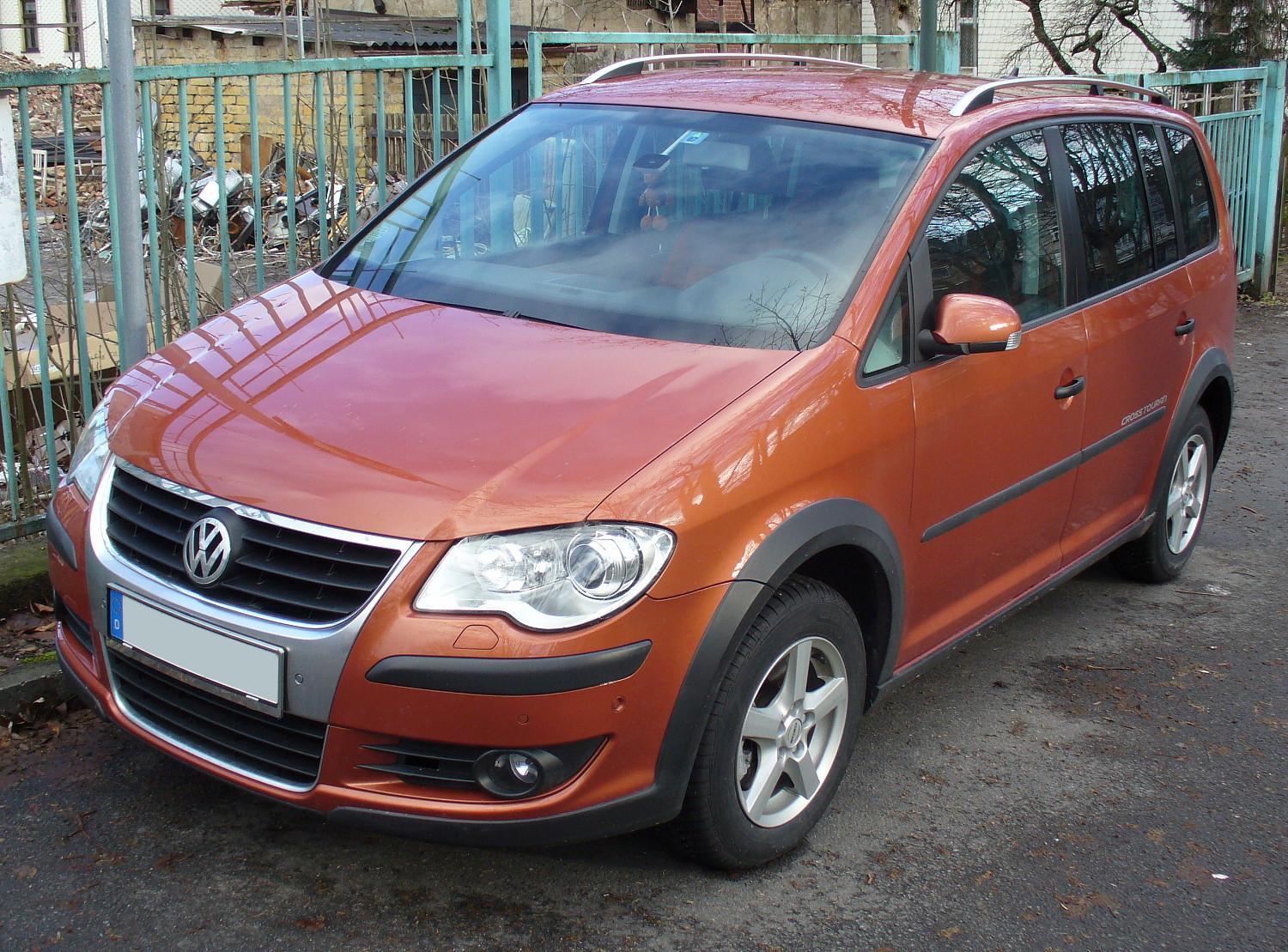 VW CrossTouran